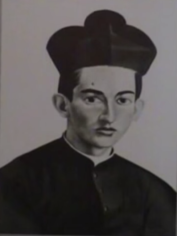 Acuarela de Jairo Arias